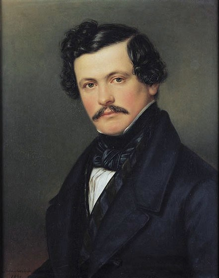 Portret młodego mężczyzny